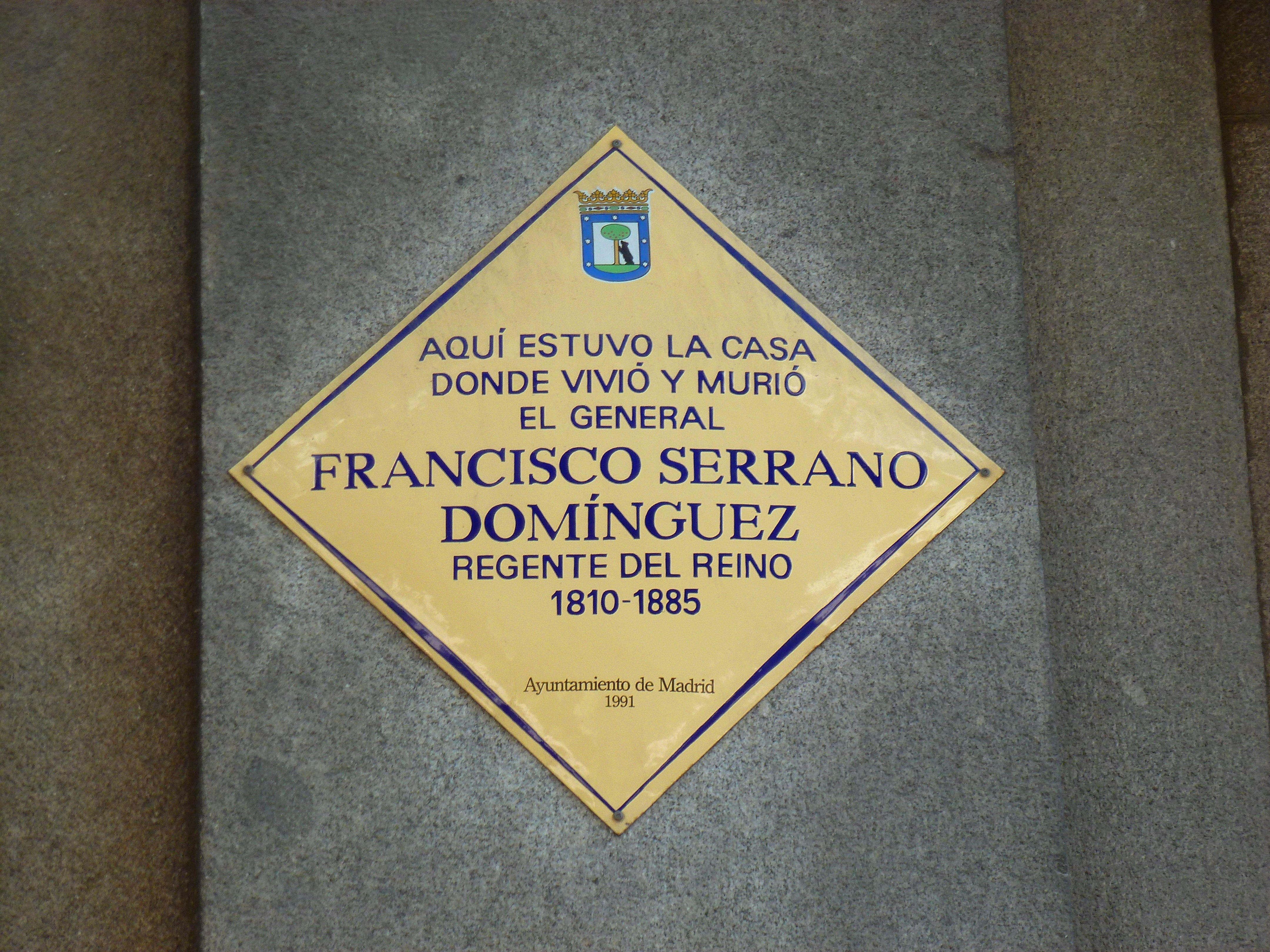 Placa conmemorativa del General Francisco Serrano y Domínguez en el número 14 de la calle que lleva su nombre en Madrid.